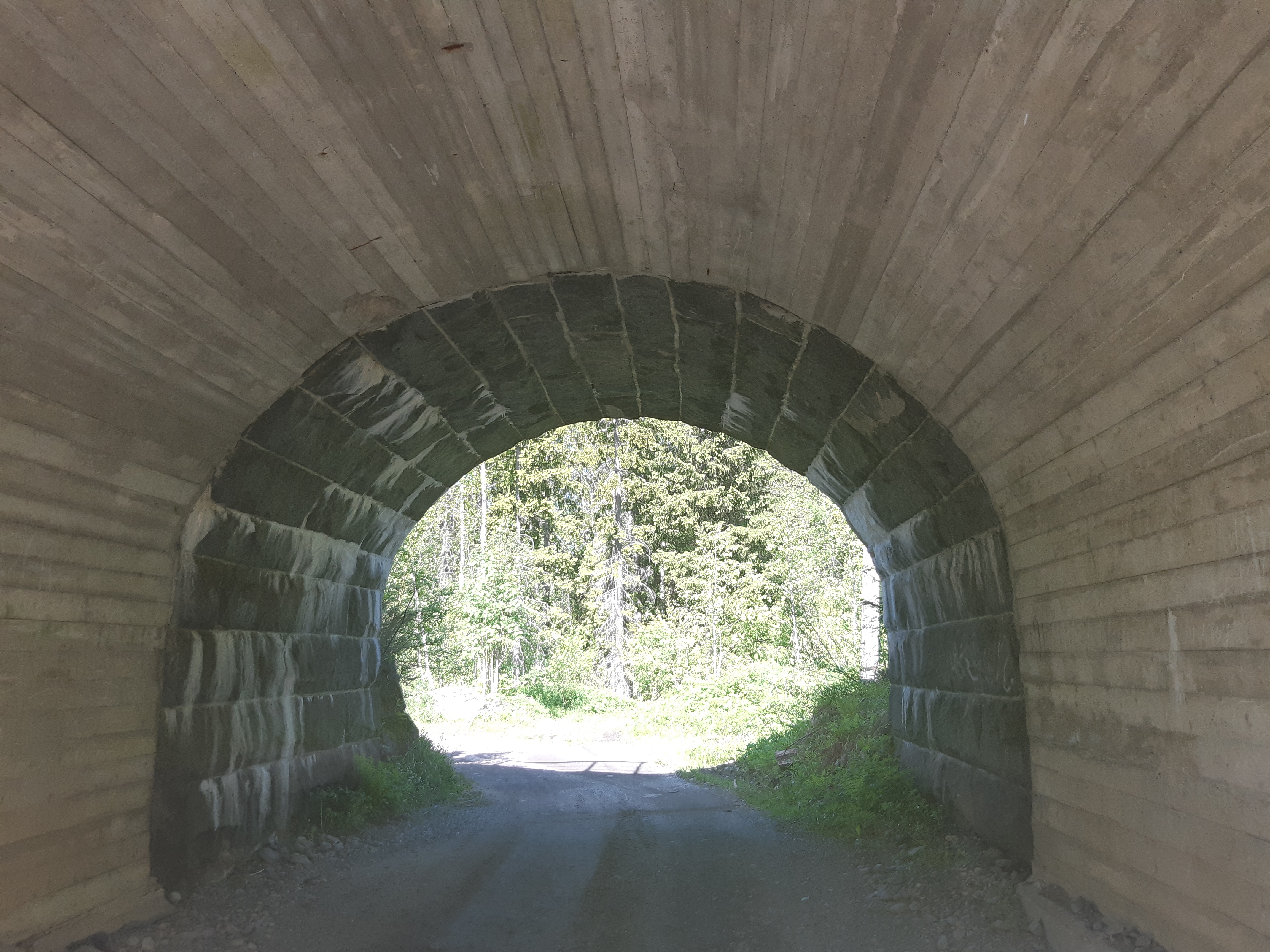 Янисъярви.